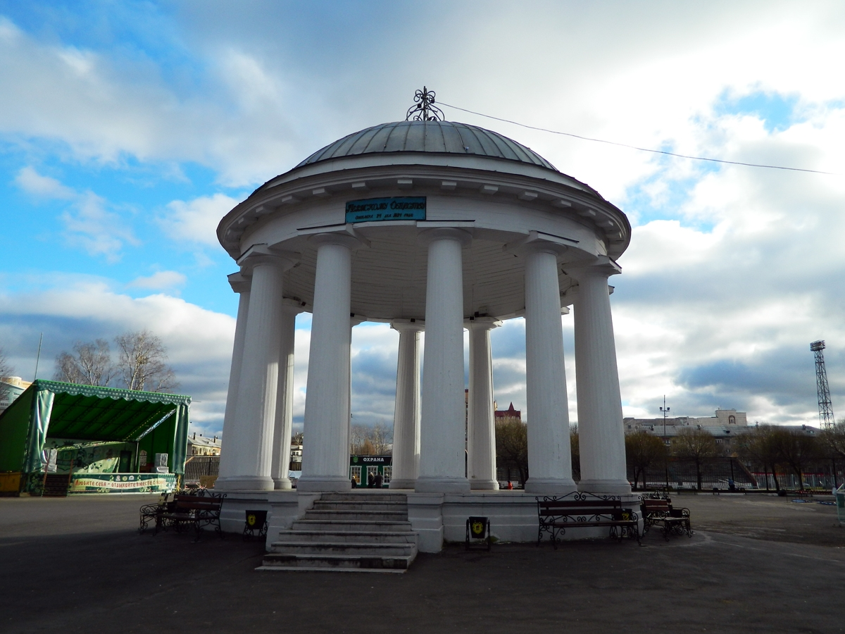 Ротонда в парке Горького (Пермь)